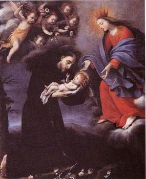 Badia di san salvatore, Vergine col Bambino e san Francesco di Orazio Fidani (1606-1656)